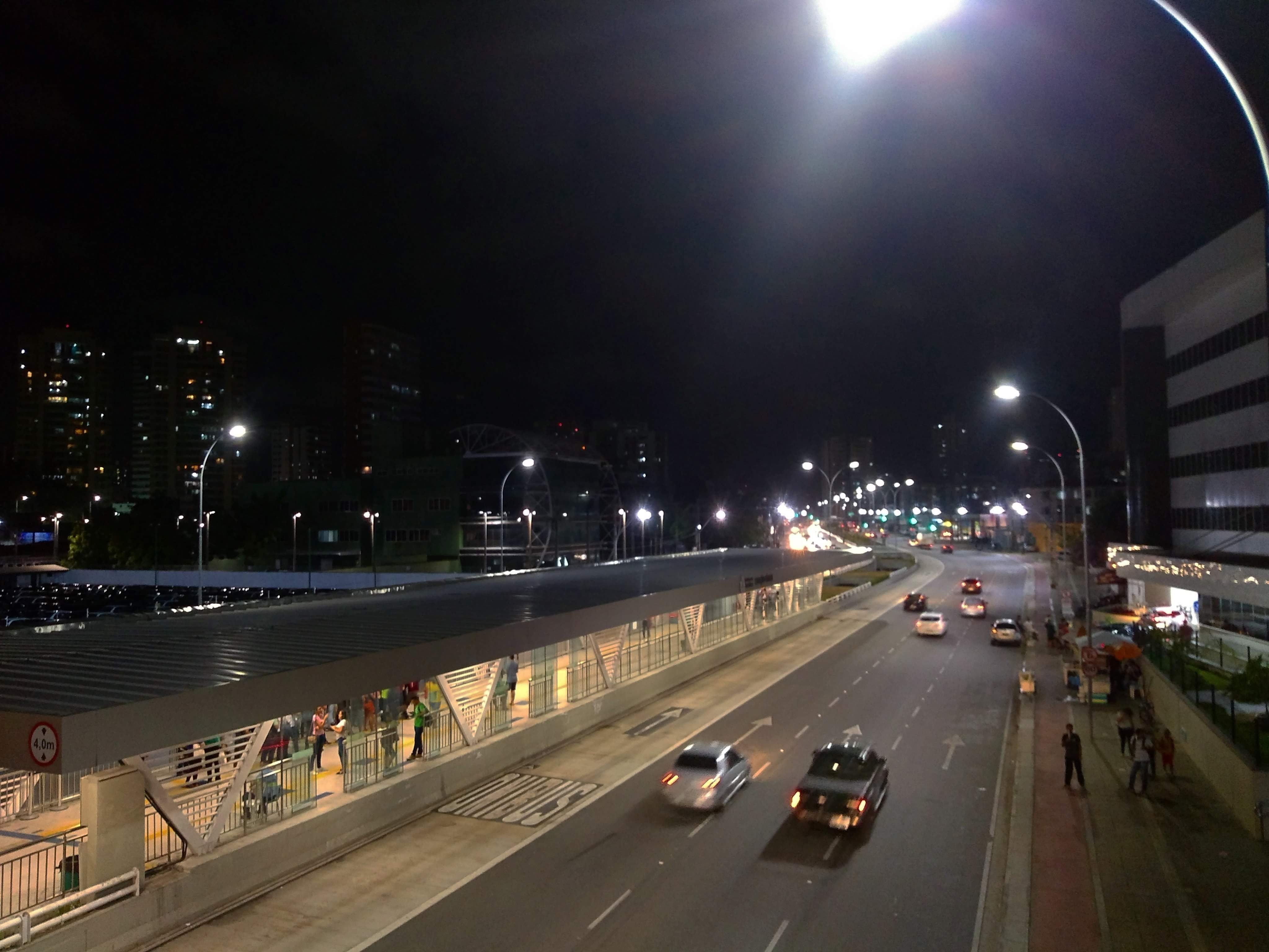 Sistema de BRT Expresso Fortaleza localizado na avenida Aguanambi na cidade de Fortaleza, Ceará, Brasil.